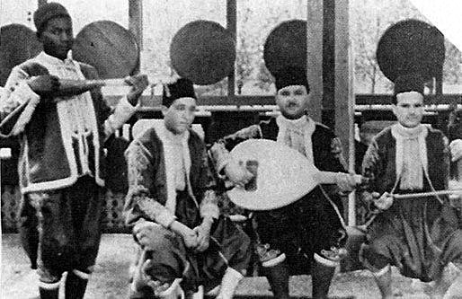 houcine slaoui jouant le malhoun Salé